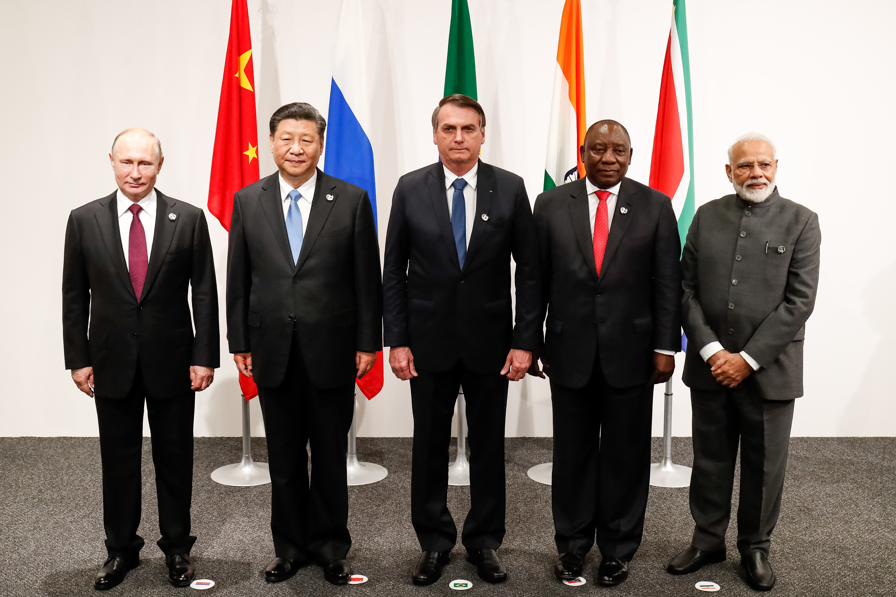 (Osaka - Japão, 28/06/2019) Presidente da República, Jair Bolsonaro, durante foto de família dos Líderes do BRICS. Foto: Alan Santos/PR